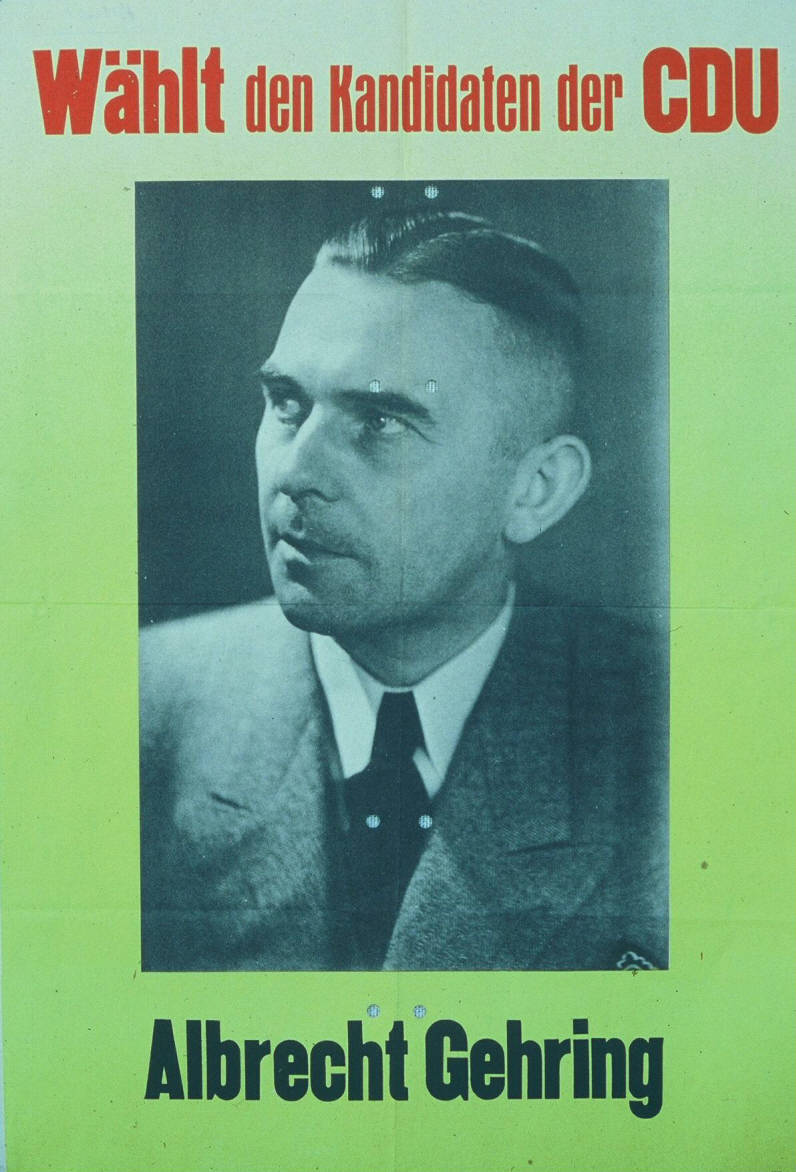 Wählt den Kandidaten der CDU Albrecht Gehring Abbildung: Porträtfoto Kommentar: Detmold Plakatart: Kandidaten-/Personenplakat mit Porträt Drucker_Druckart_Druckort: Haberbeck BDA 7, Lage-Lippe Objekt-Signatur: 10-001: 110 Bestand: Plakate zu Bundestagswahlen (10-001) GliederungBestand10-18: Plakate zu Bundestagswahlen (10-001) » Die 1. Bundestagswahl am 14. August 1949 » CDU » Mit Porträtfoto Lizenz: KAS/ACDP 10-001: 110 CC-BY-SA 3.0 DE